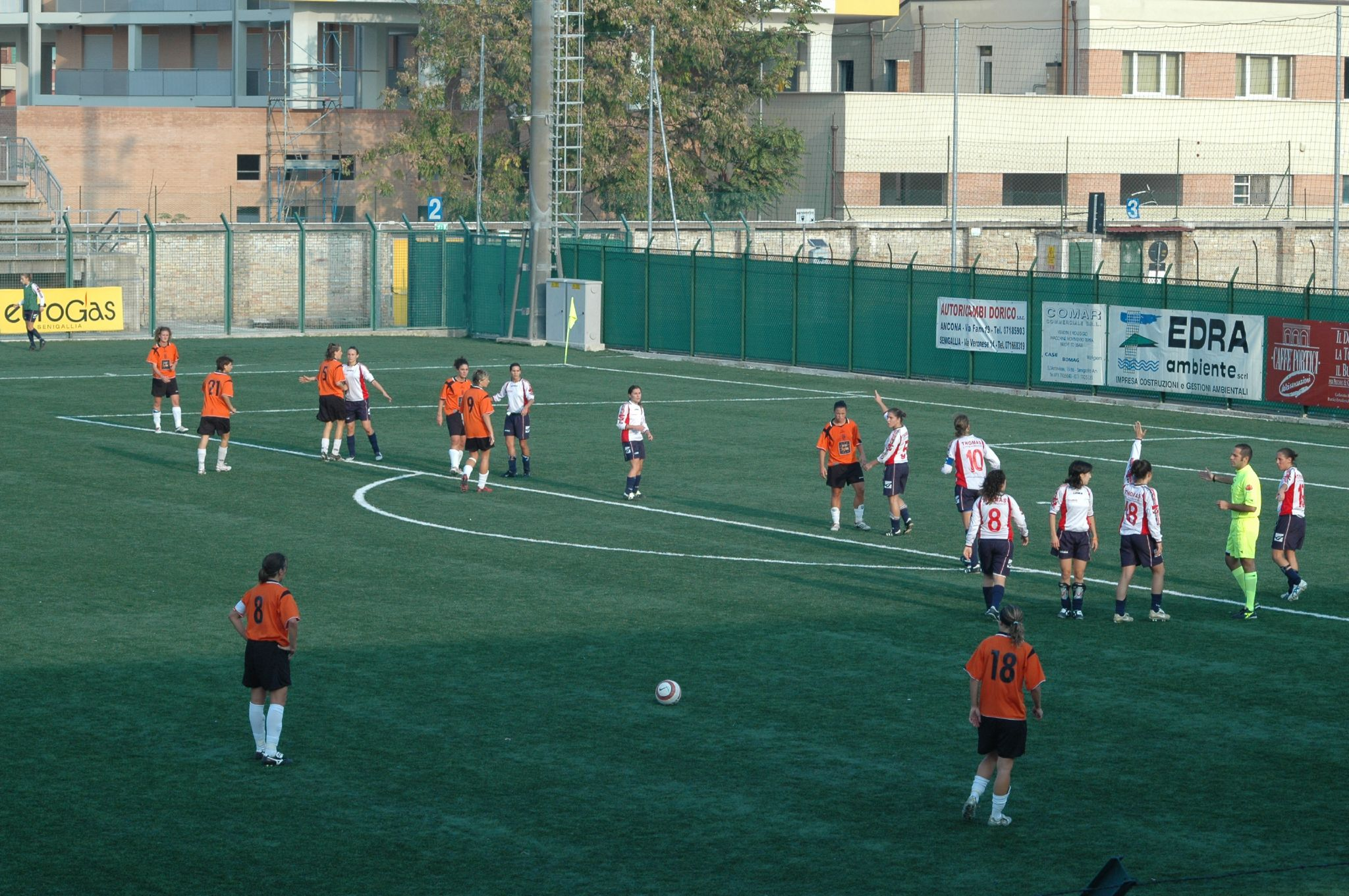 Campionato nazionale femminile Serie A 2006-2007, 2° giornata andata, Vigor Senigallia-Torres finita 1-2. calcio di punizione per il Torres.